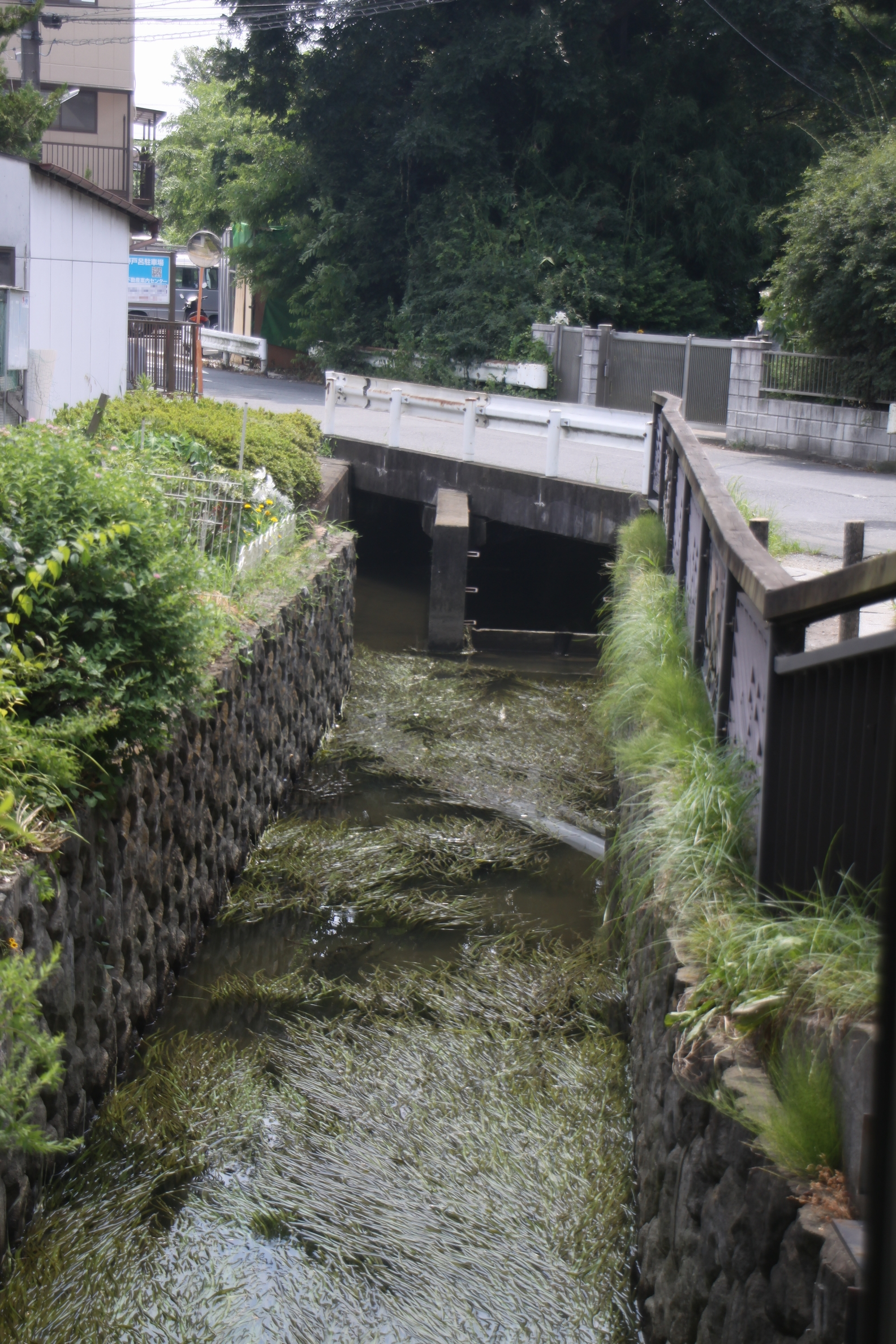 大丸用水川崎市多摩区菅